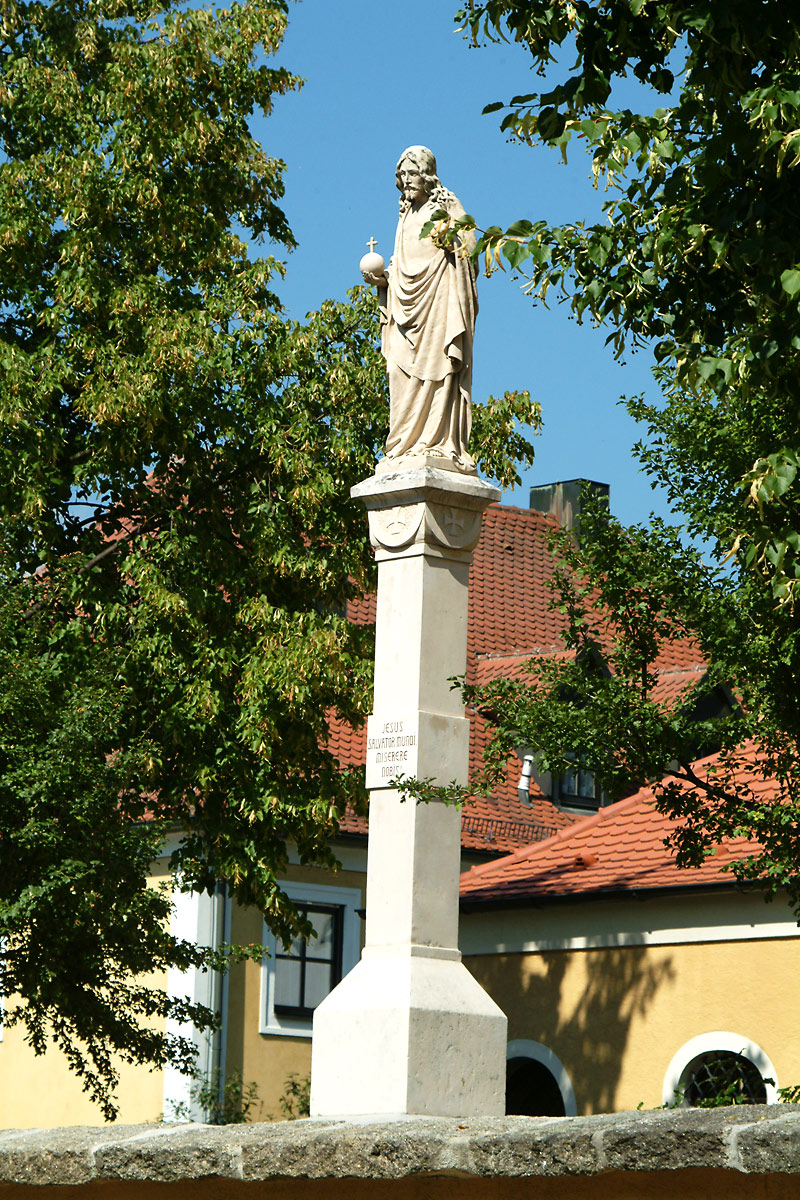 Salvatorsäule Hirschau Komplettansicht